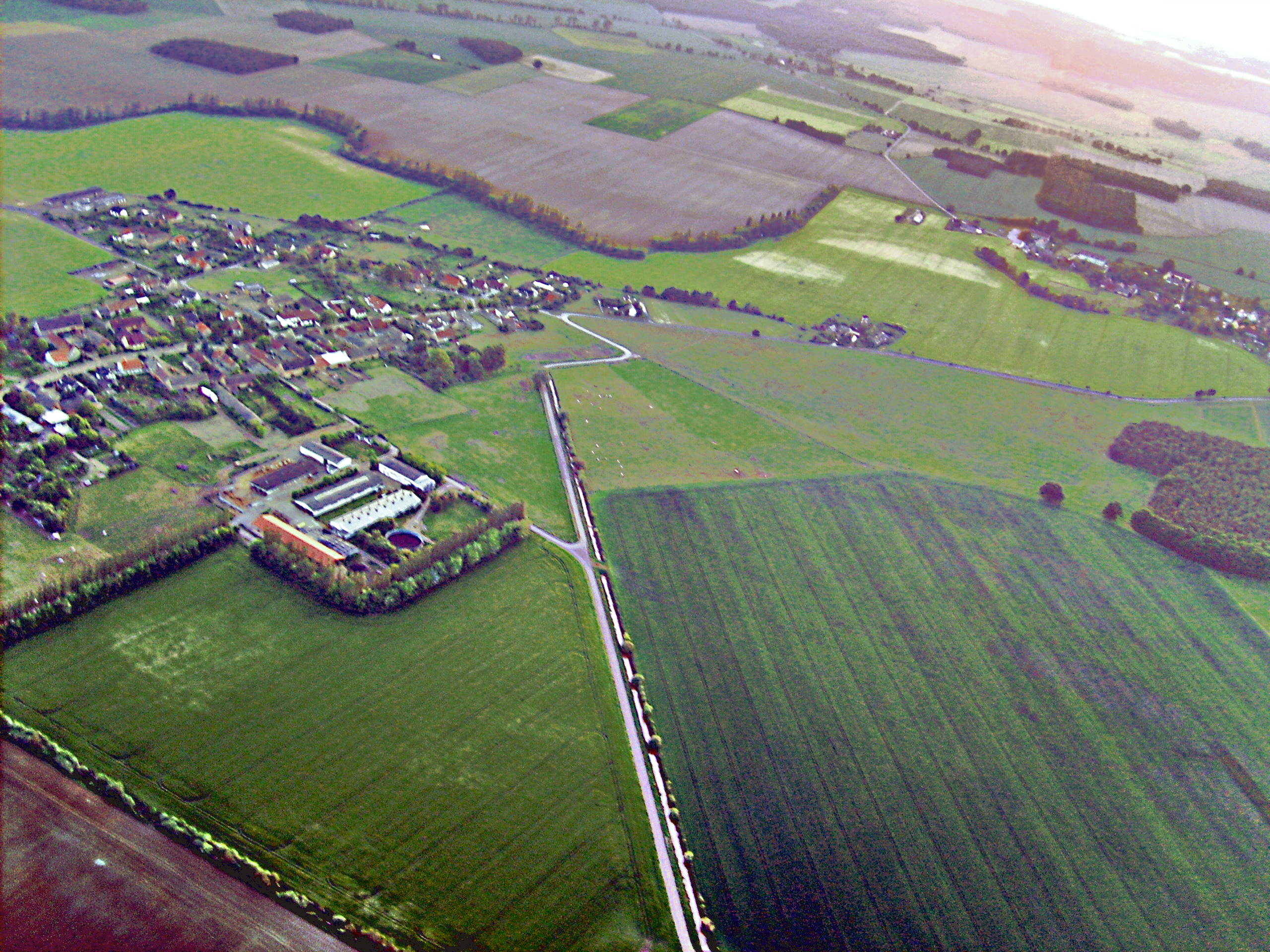 Der Ort Kauxdorf aus der Luft.